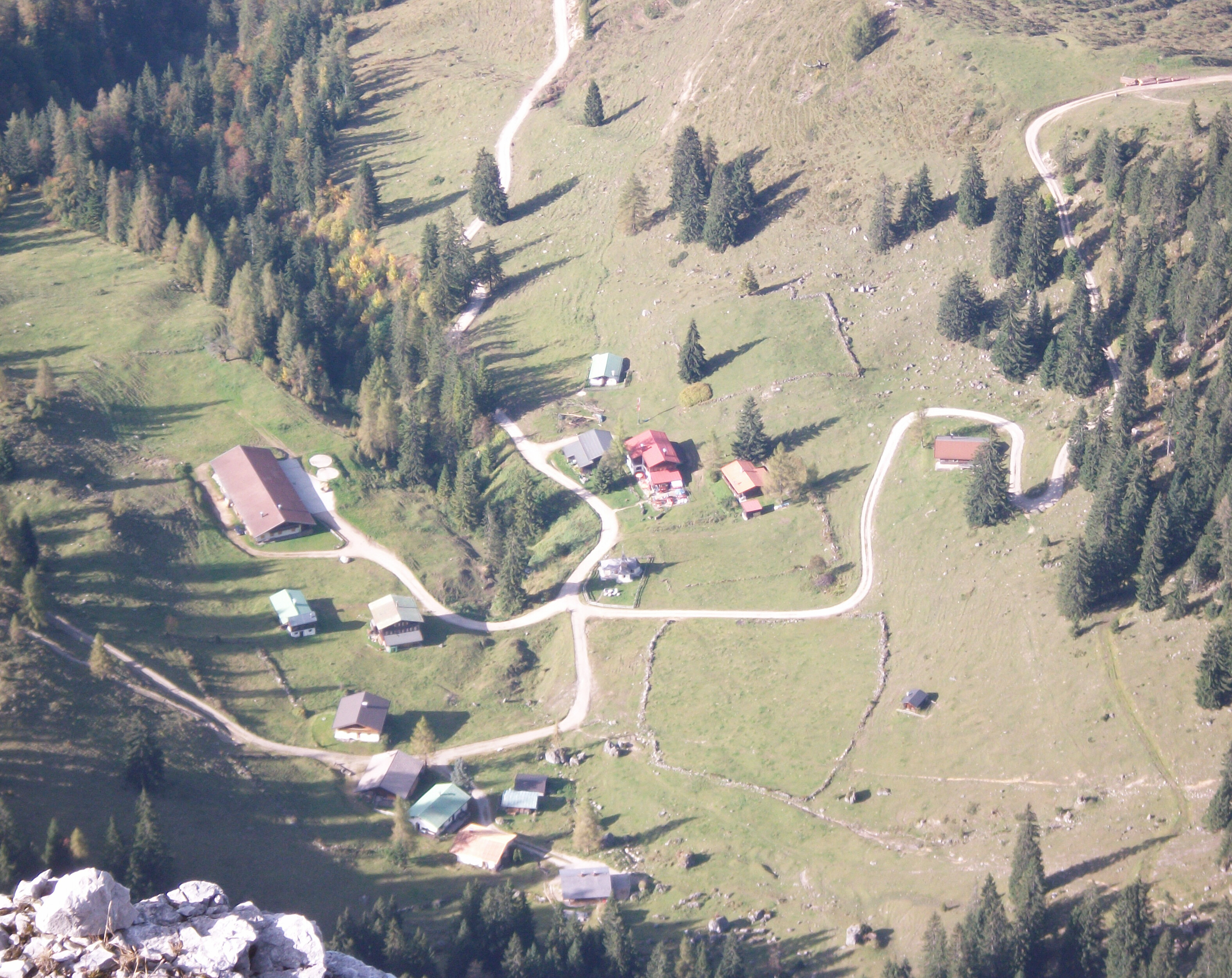 Steinbergalm